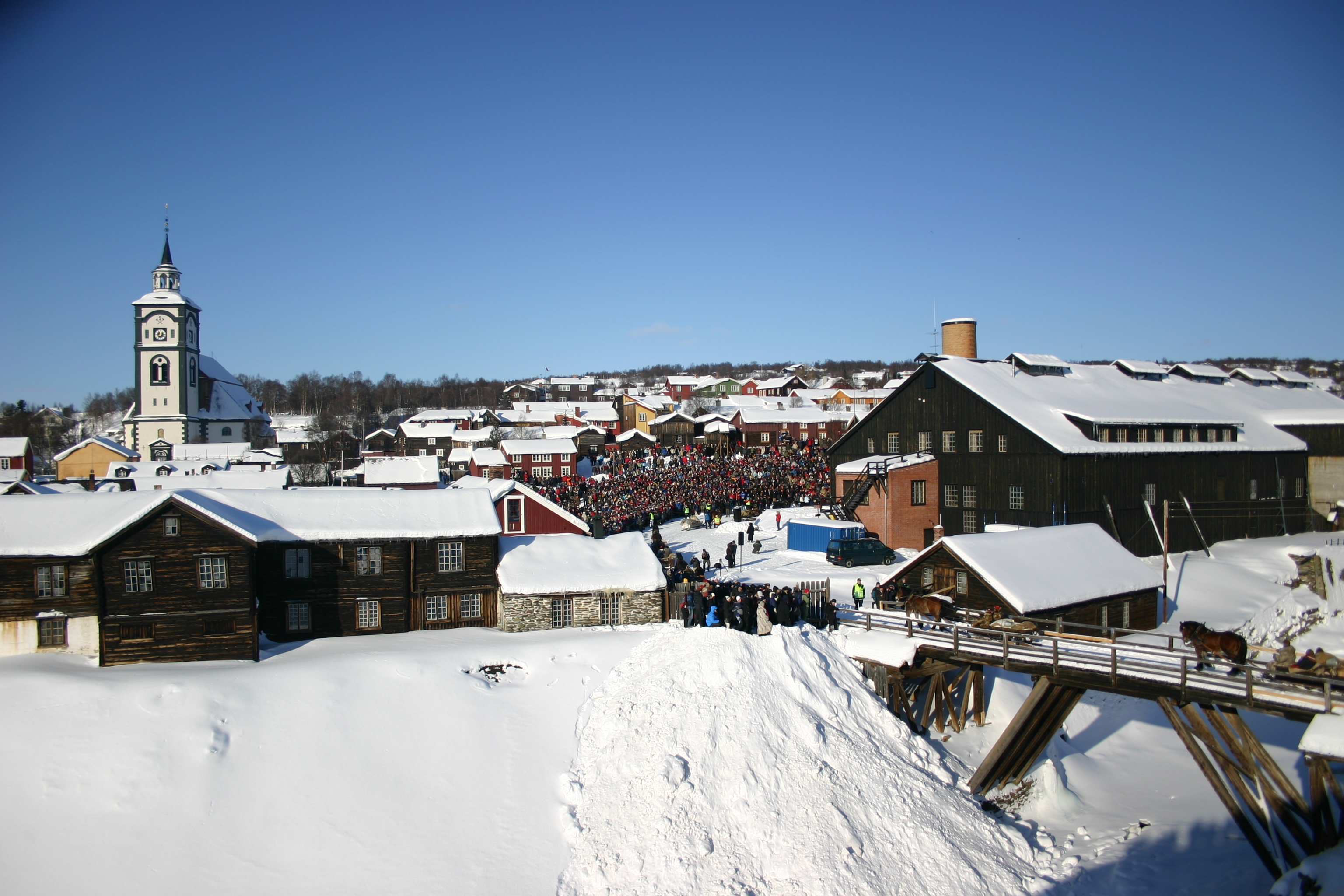 Opningen av Rørosmartnan 20. februar 2007. Ein ser ut over malmplassen der fôrbøndene kjem med hest og slede. Nokon v dei heilt frå Falun i Dalane, og turen har tatt inntil 17 døgn. Det kom omlag 90 hestesledar denne dagen. I tidlegare tider har det vore opptil 1500 sleder på martnan, og det det har vore omsett 10 000 skinn. Ein ser Bergsataden Ziir til venstre og den gjenoppbygde smeltehytta til høgre